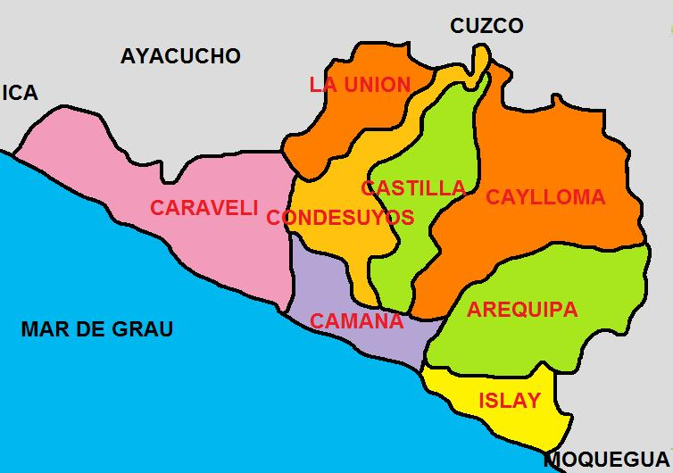 Imagen que muestra la División Politica del Departamento de Arequipa, una de las 25 circunscripciones en que se divide el Perú